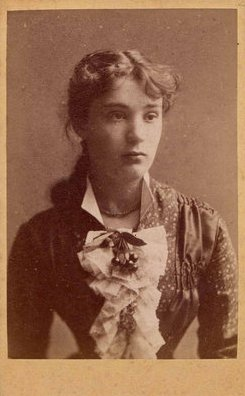 Csillag Teréz (1862-1925) kb. 20 éves korában